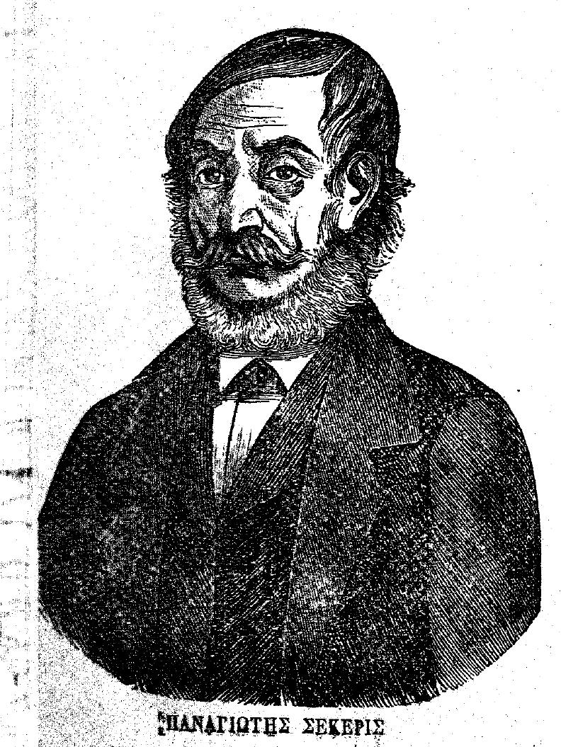 Griechischer Stifter, 19. Jahrhundert